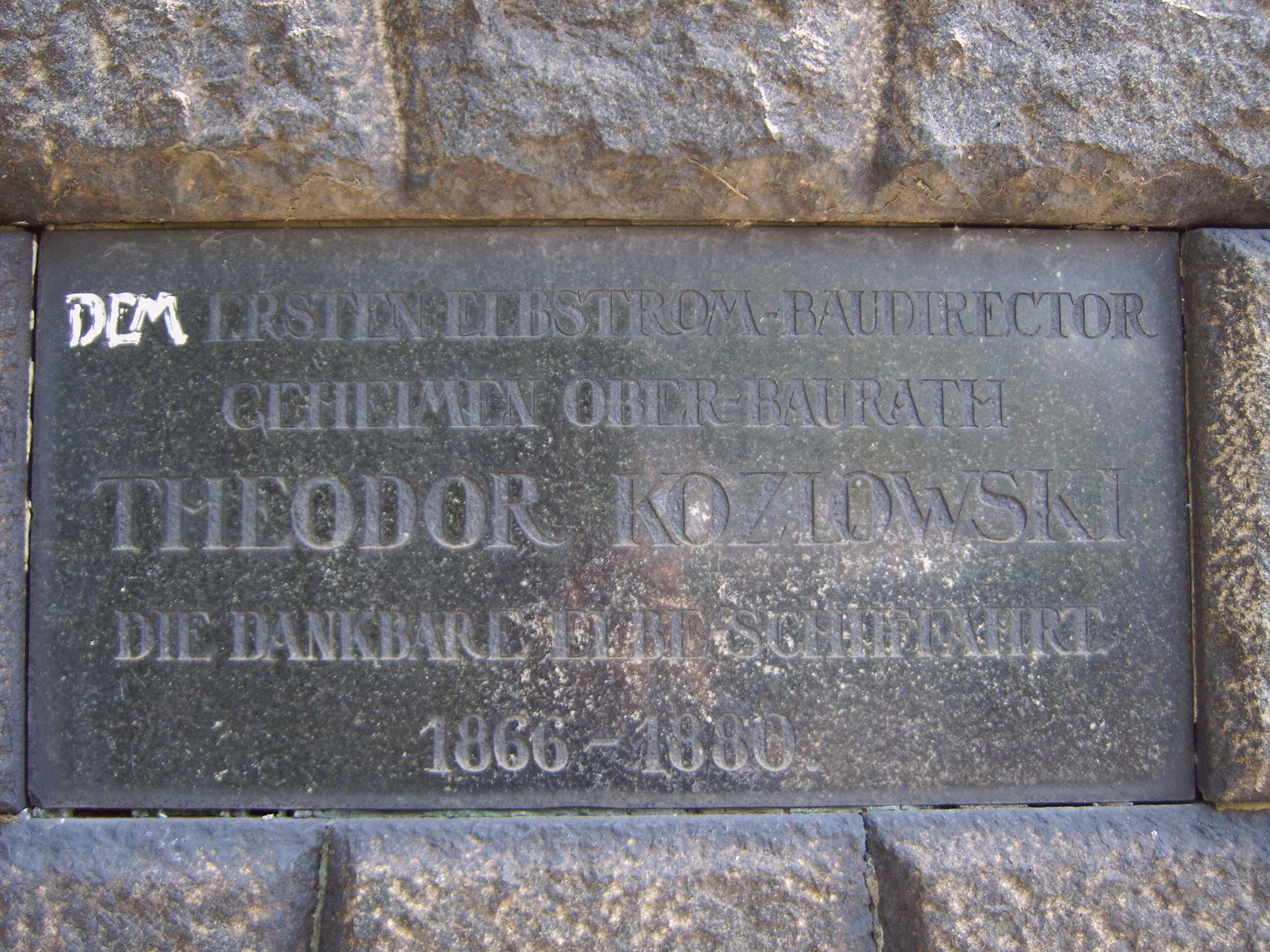 Inschrift am Denkmal für Theodor Kozlowski in Magdeburg, Deutschland Bild aufgenommen am 8.5.2006